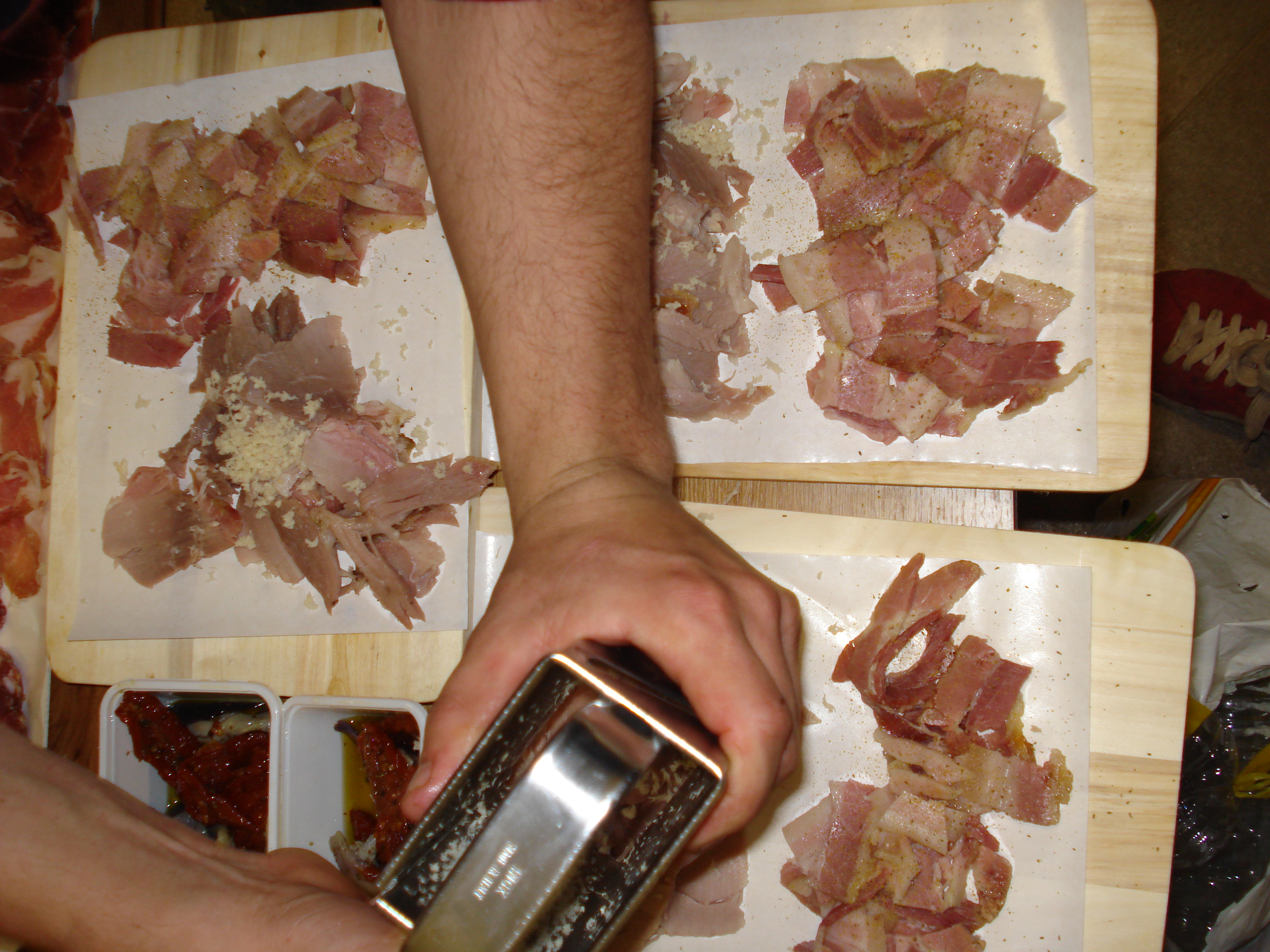 salumi, prosciutto cotto